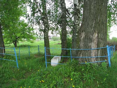 Один из памятников на месте расстрела евреев Орши во время Холокоста.